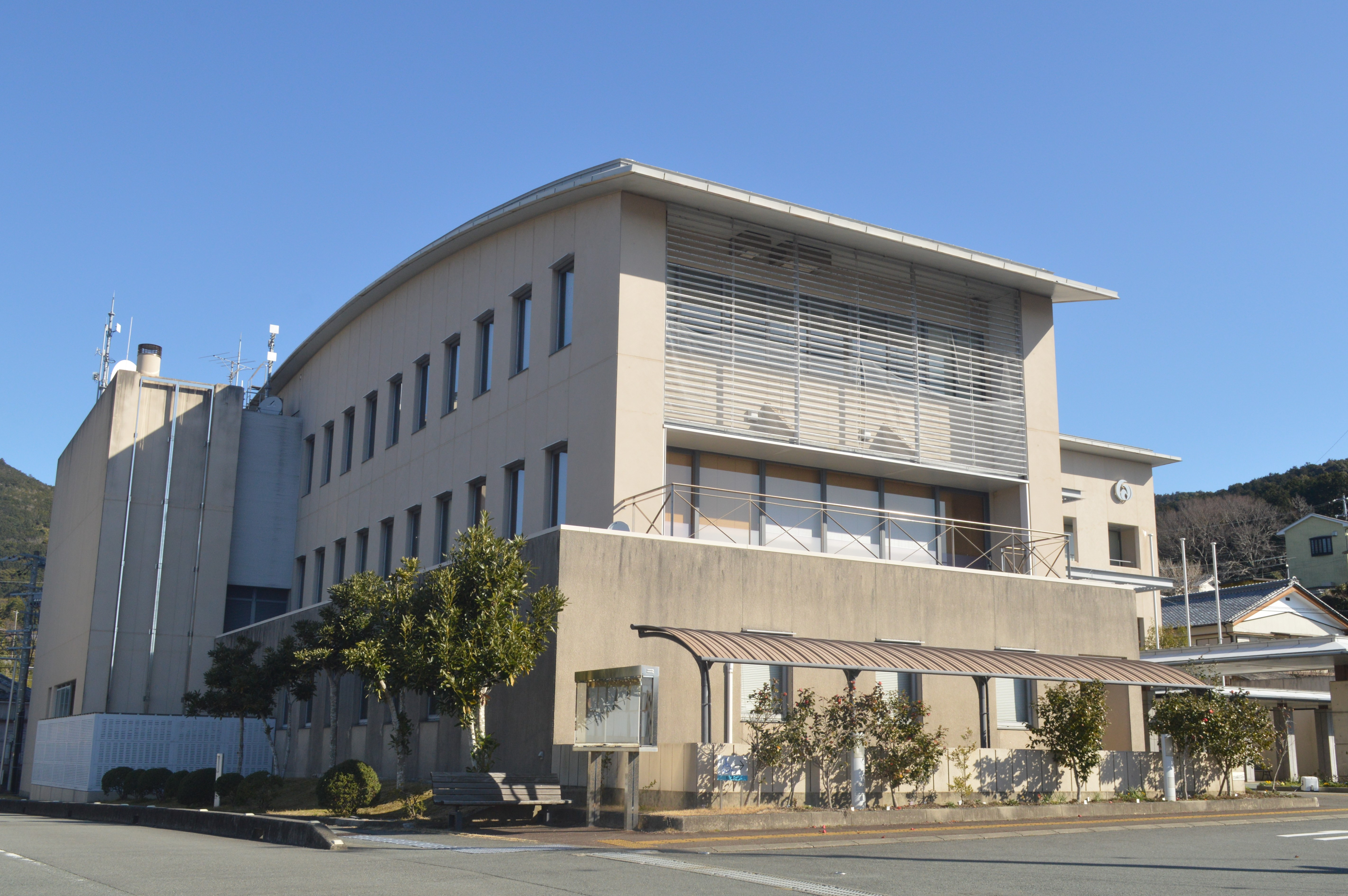 三重県度会郡南伊勢町にある南伊勢町役場。